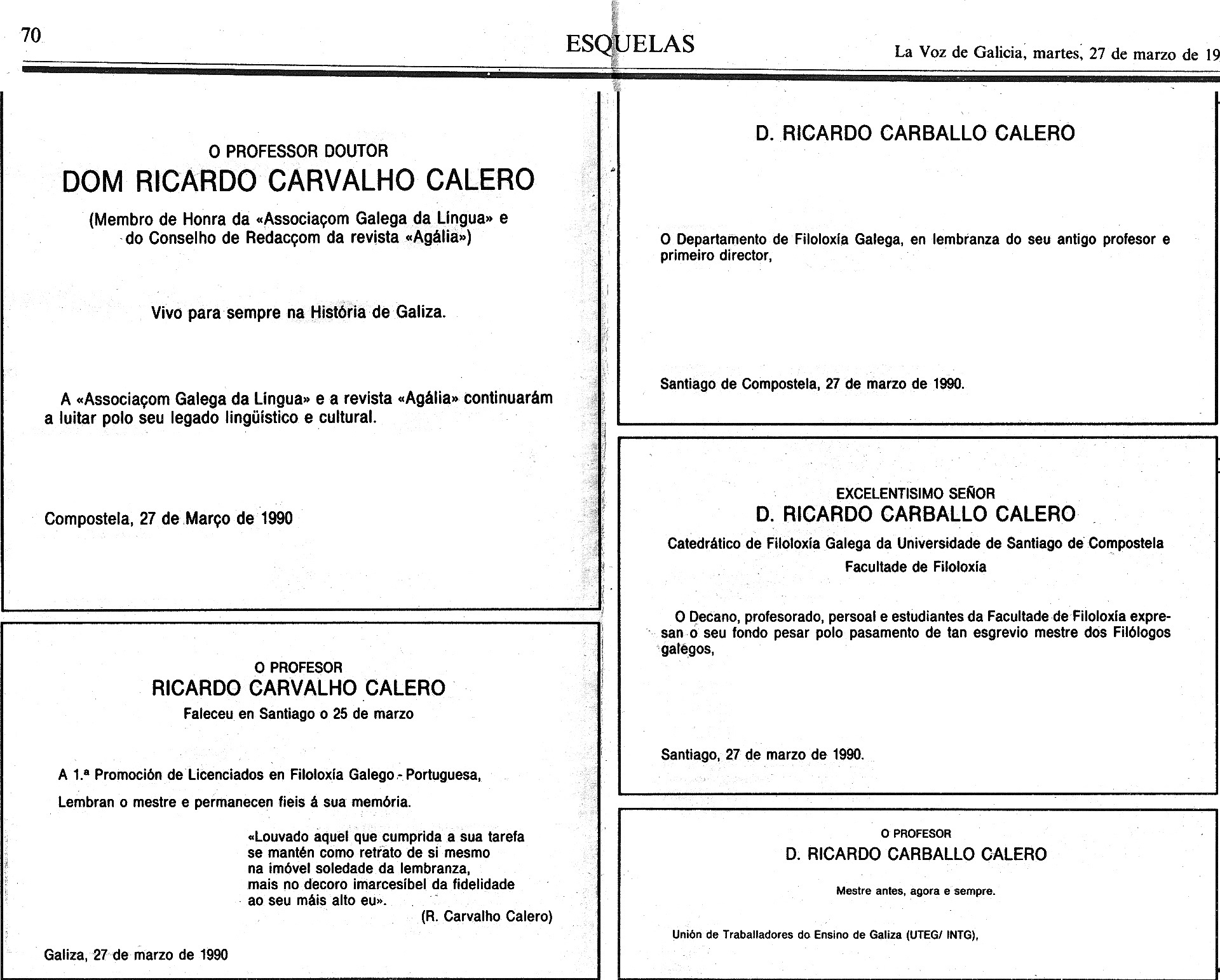 Necrolóxicas publicadas n'La Voz de Galicia no pasamento de Ricardo Carballo Calero